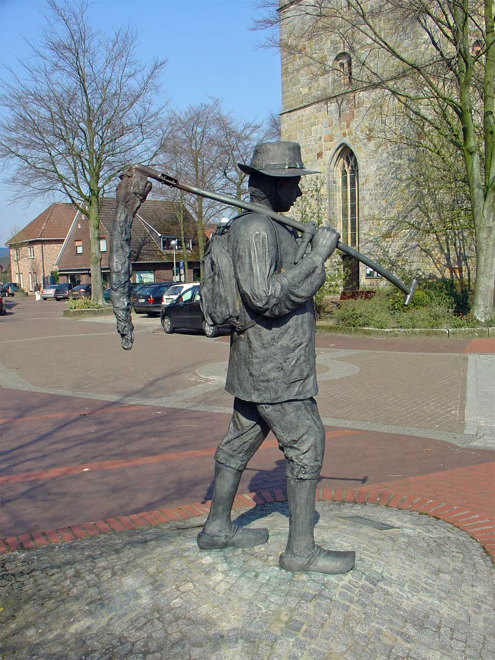 Hannekemaaier in Uelsen door Leo Janischowsky + partner (1997)